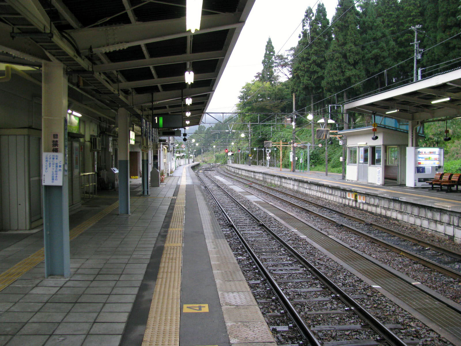 JR大糸線南小谷駅